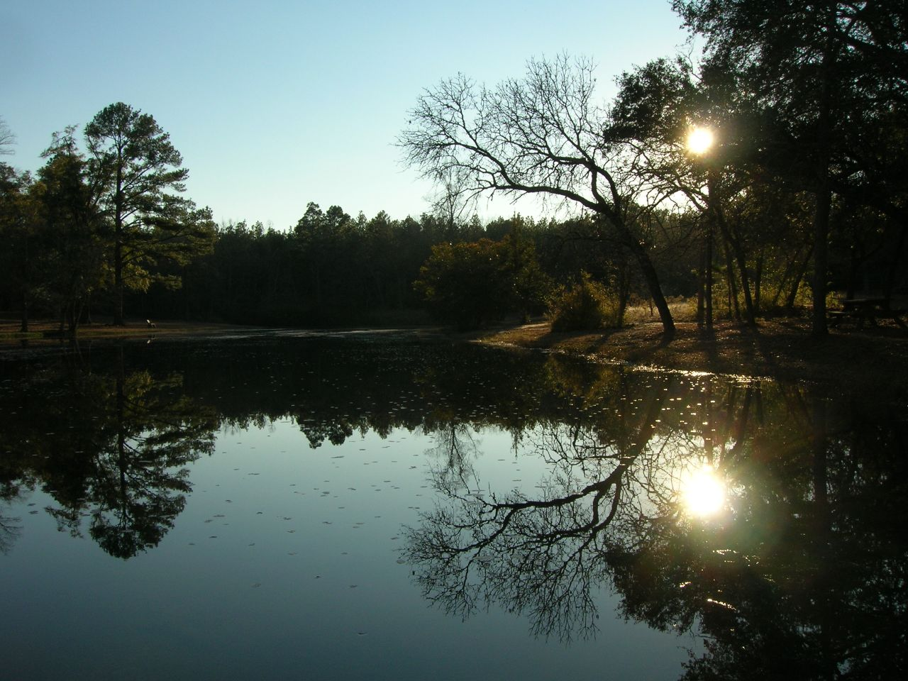 Aiken State Natural Area lake